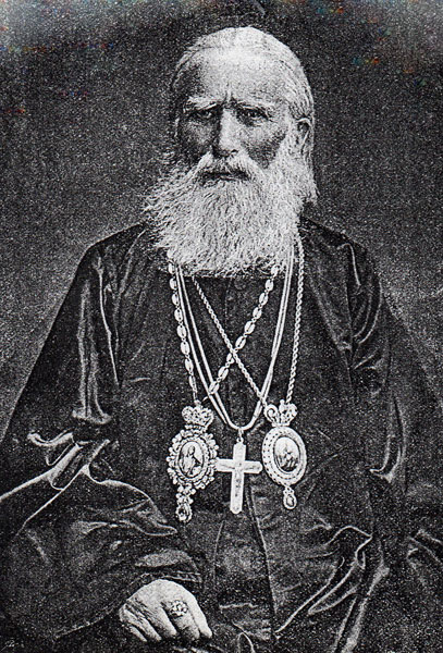 Митрополит Ђорђе Николајевић (1807-1869)